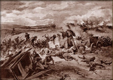 Adolf Liebscher - Bitva mezi Tábory a Pražany u Lipan r. 1434